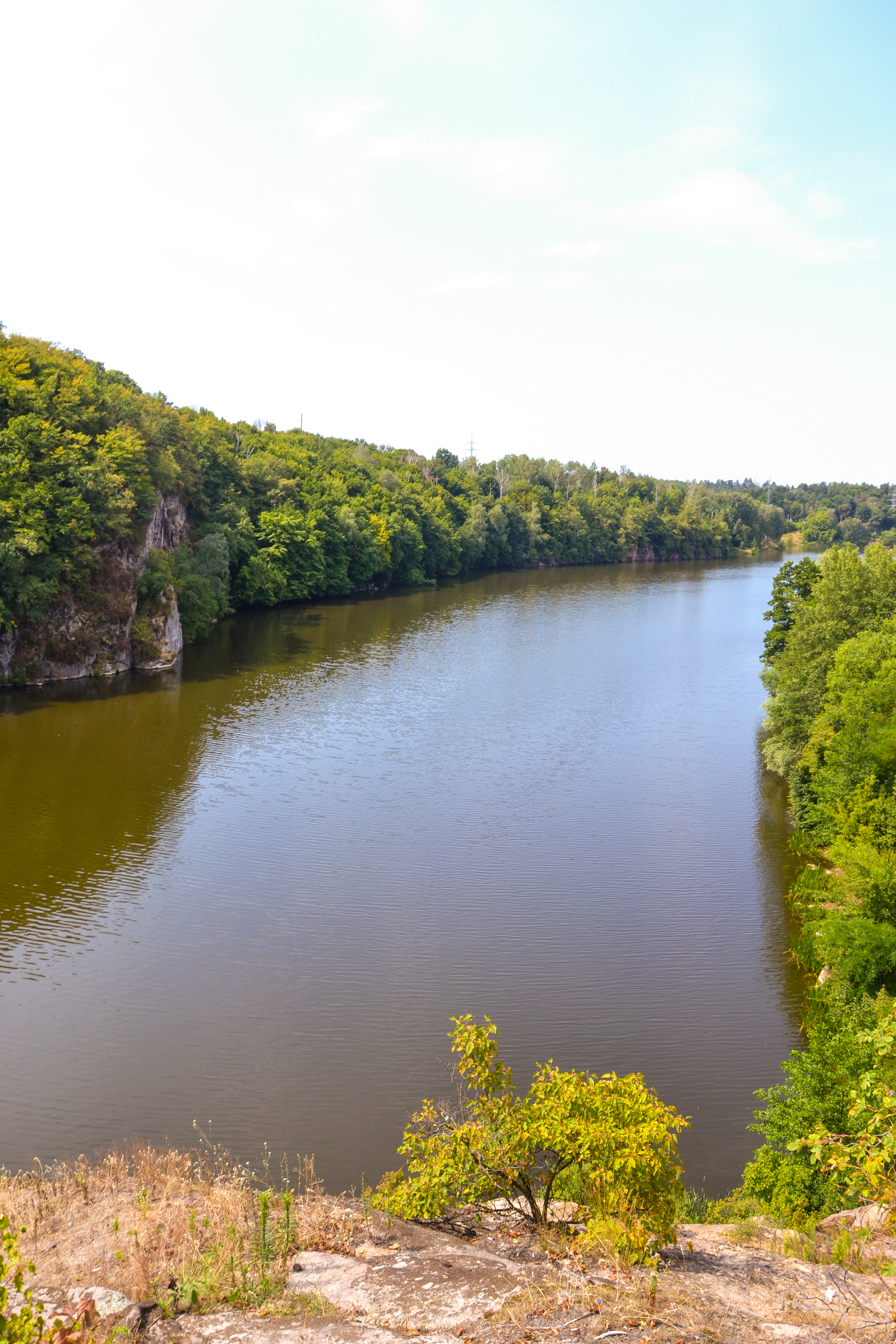 Річка Тетерів на скелі над головою Чацького